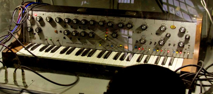 Steiner-Parker Synthacon Tecnópolis Sonora - Instalación de Pablo Gil y Ernesto Romeo.